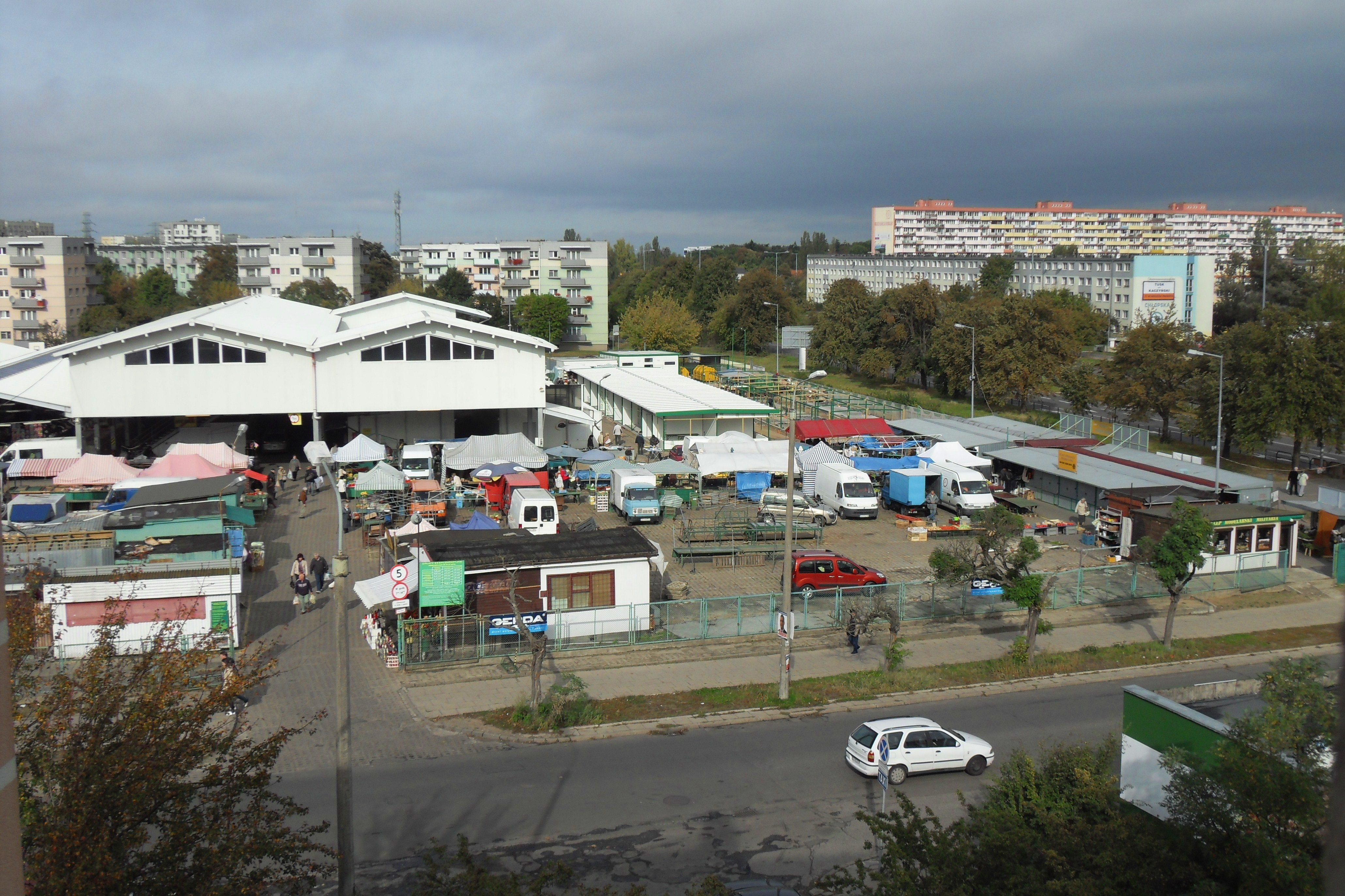 Gdańsk Przymorze Małe. "Zielony Rynek", ul. Czerwony Dwór, skrzyżowanie z ul. Chłopską.